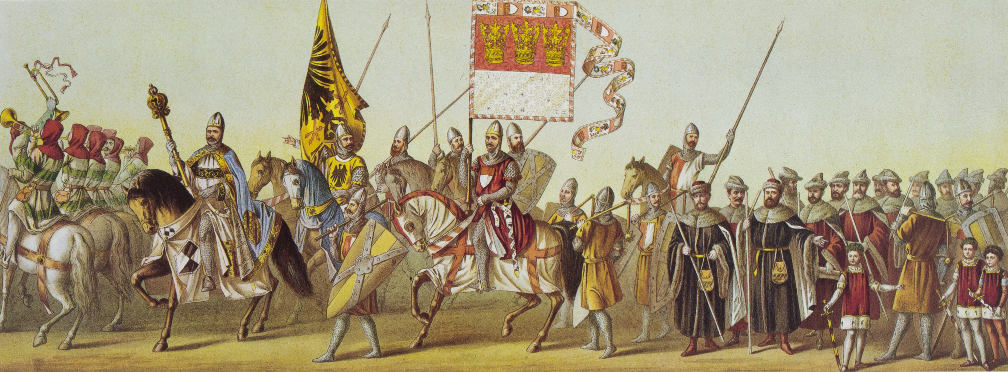 Tony Avenarius: Historischer Festzug veranstaltet bei der Feier der Vollendung des Kölner Doms am 18. October 1880. Tafel I